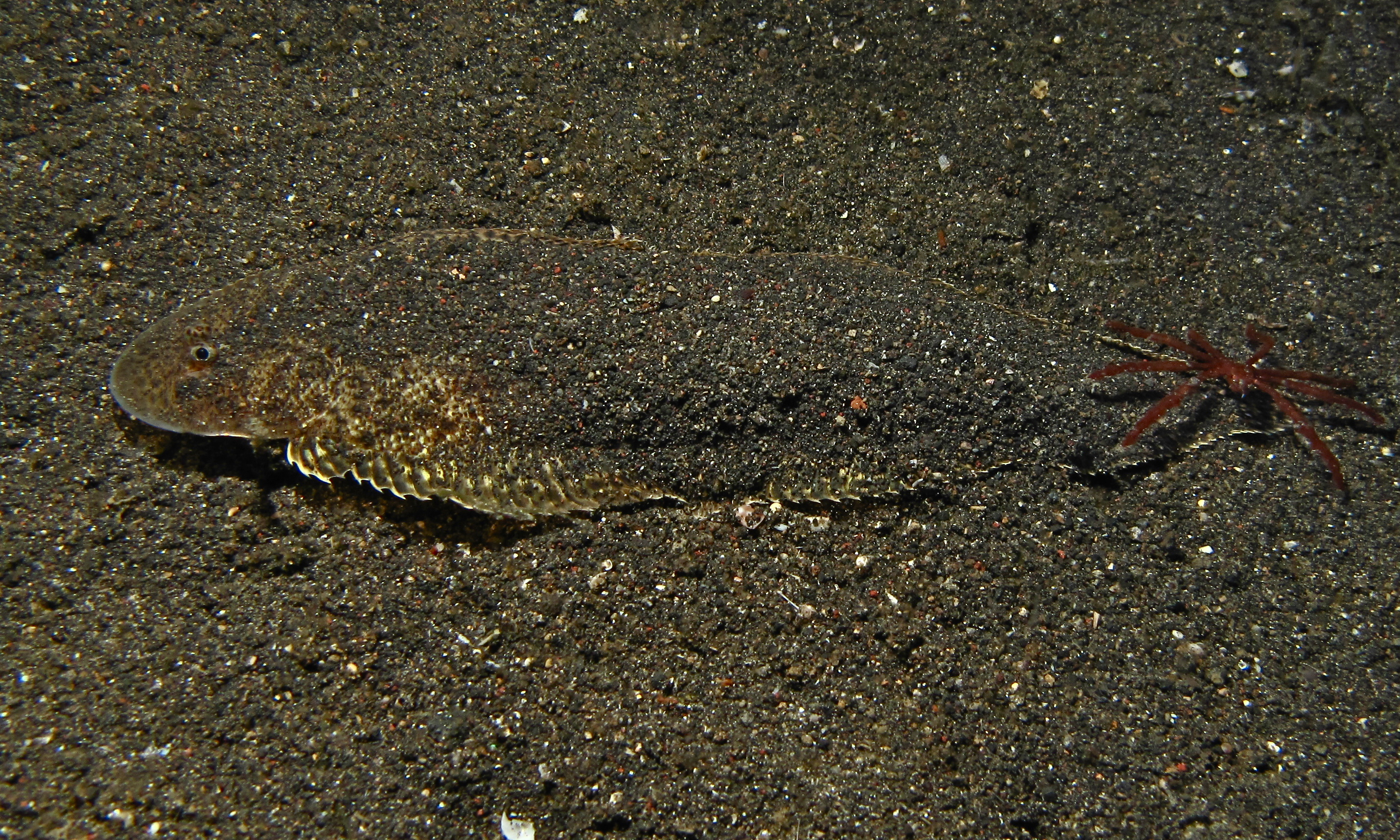 Jahir, Lembeh Strait, Sulawesi, INDONESIA